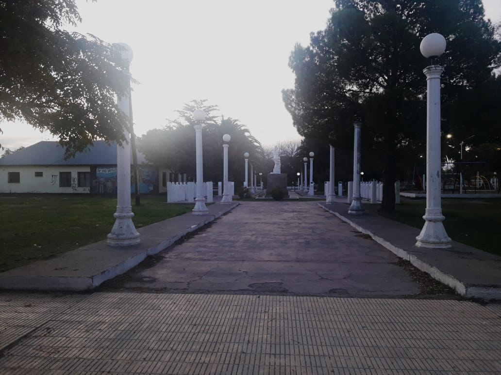 Plaza de la Madres, se encuentra en un espacio céntrico de la localidad, junto con un espacio recreativo para los niños